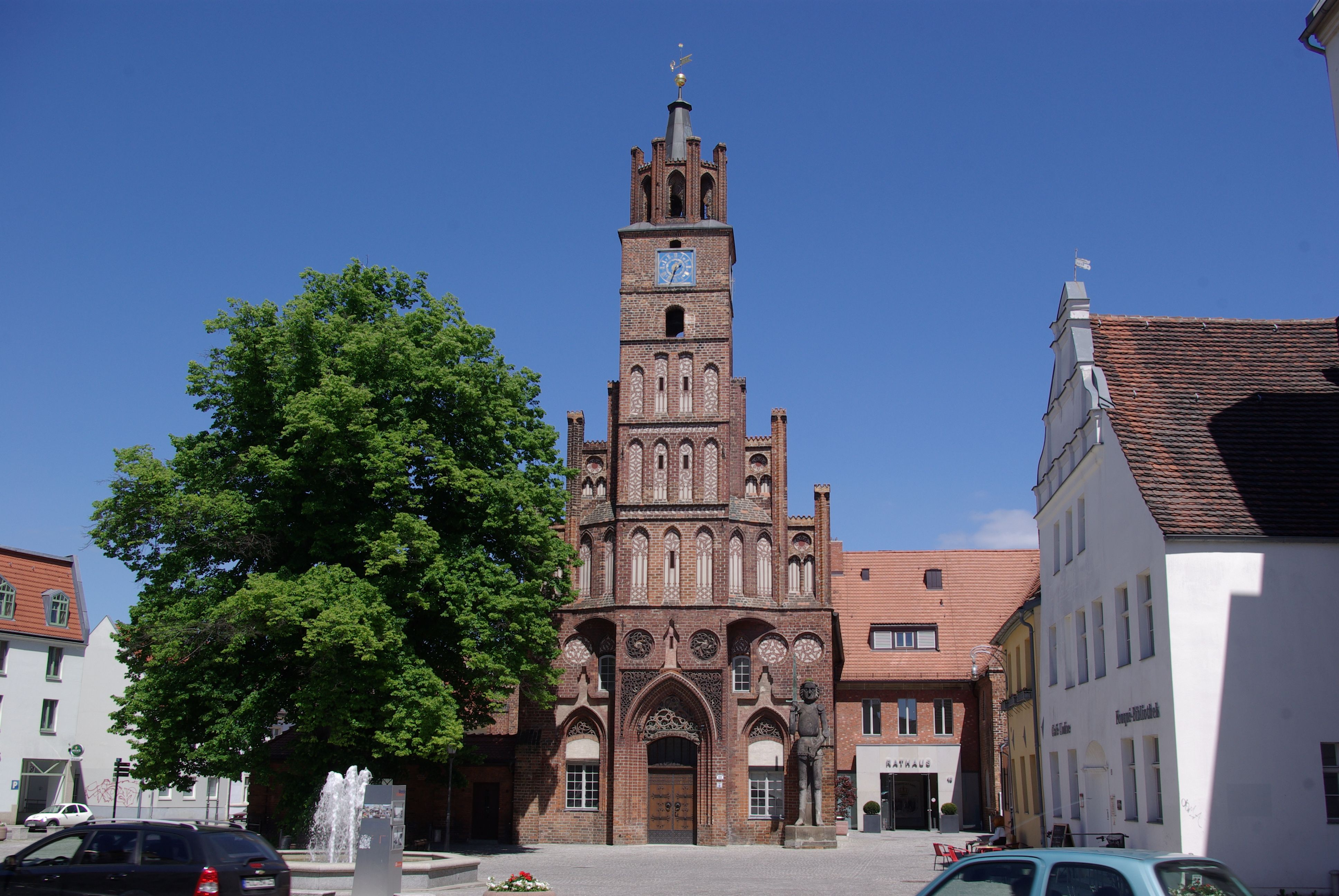 Brandenburg an der Havel, Stadtteil Altstadt. Das Haus in der Altstädtischer Markt 11 steht unter Denkmalschutz.